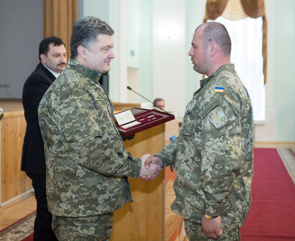 Президент Украины Пётр Порошенко вручает Василию Зубаничу диплом к званию «Герой Украины» и орден «Золотая звезда»